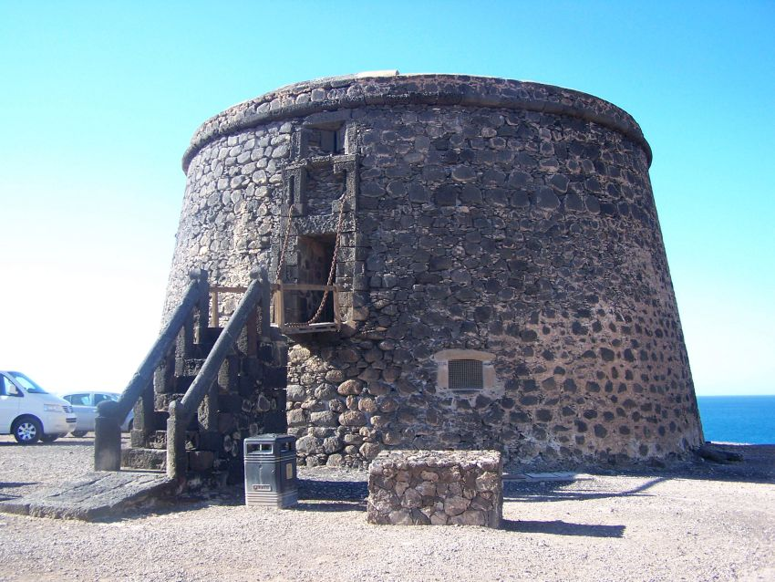 Festung von El Cotillo